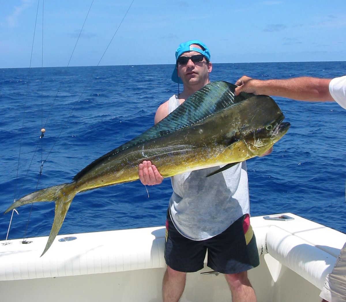 28 lb bull Mahi Mahi caught in Islamorada, 2005